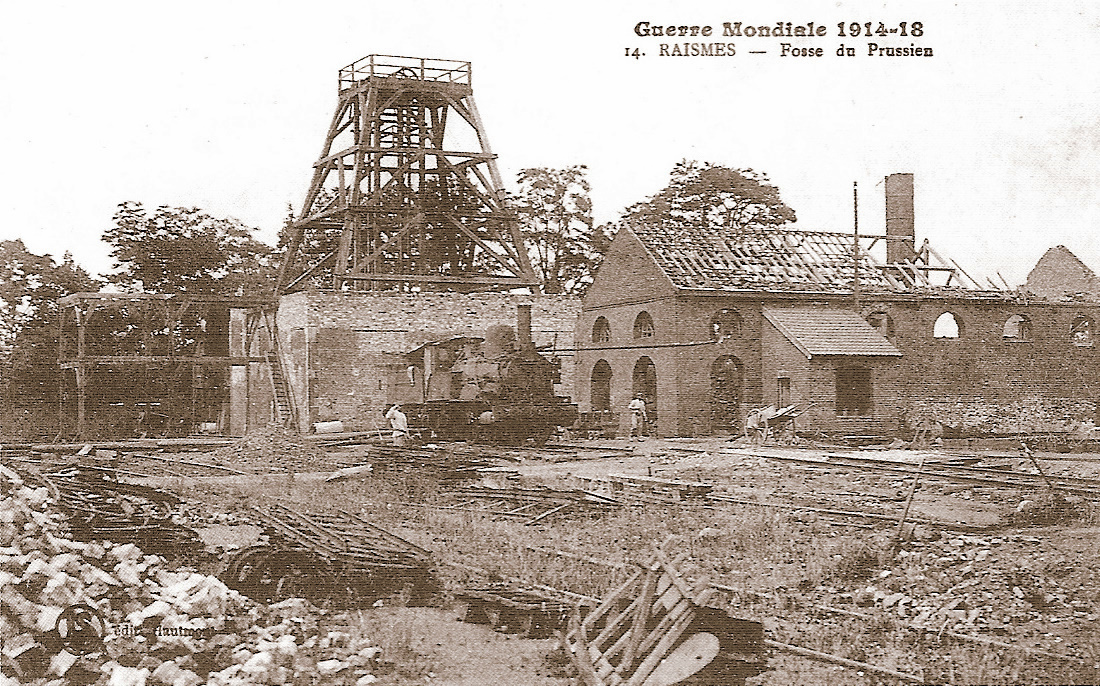 La Fosse n° 1 ou Boitelle ou Prussien de la Compagnie des mines de Vicoigne était un charbonnage constitué d'un seul puits situé à Raismes, Nord, Nord-Pas-de-Calais, France. Fin 1918, la fosse est ici en reconstruction.